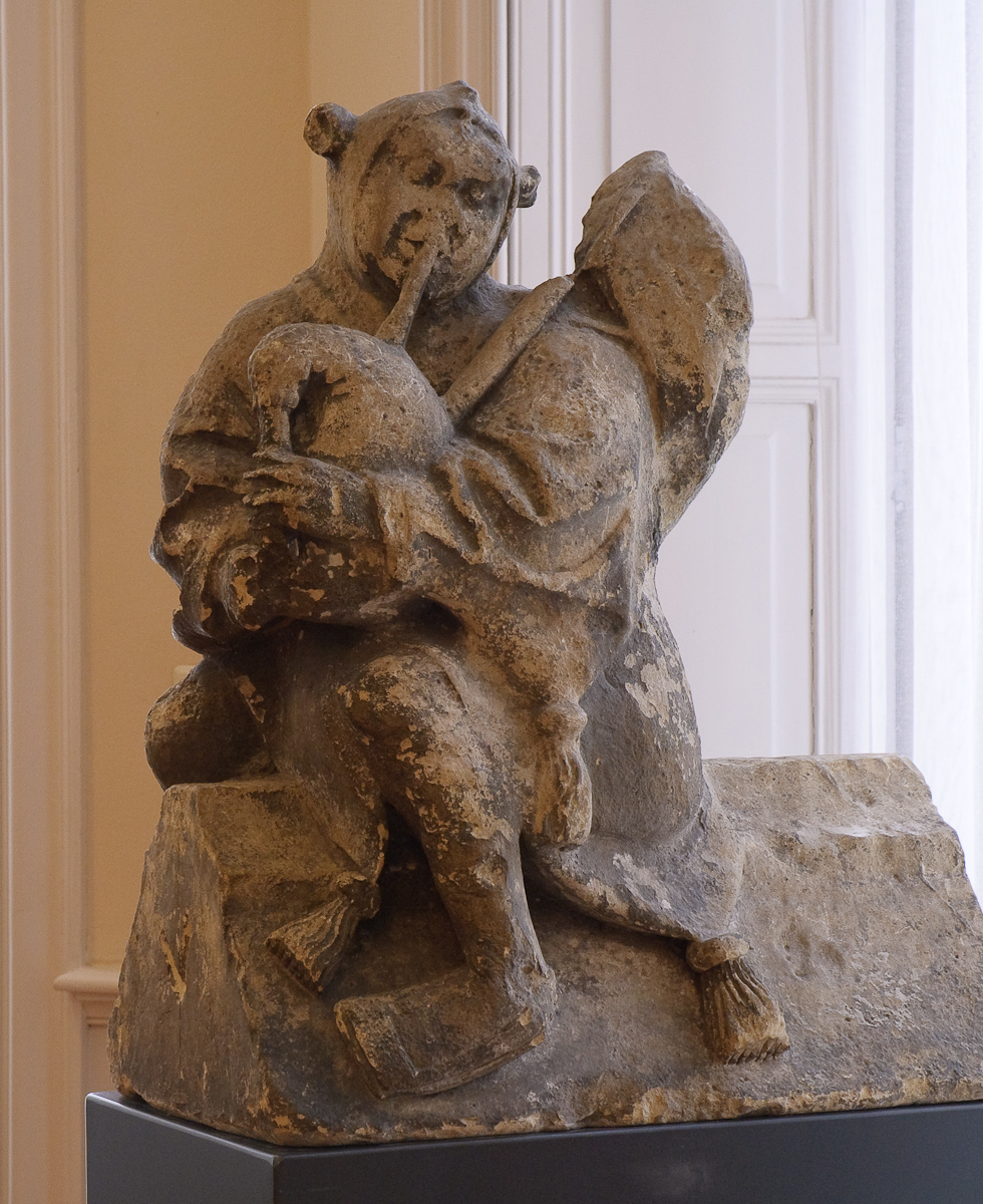 Luchtboogfiguur van de Sint-Janskathedraal in 's-Hertogenbosch.